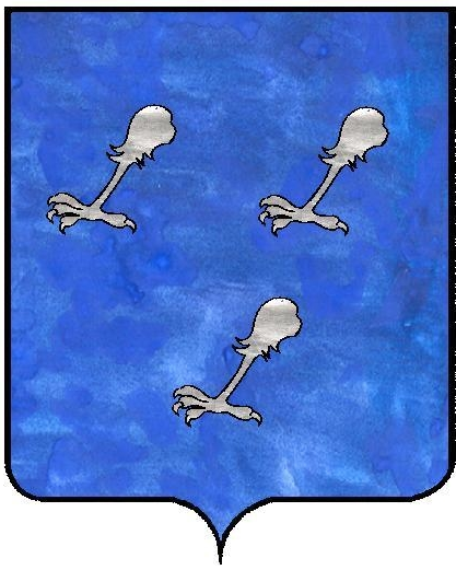 Armes Famille de Landevoisin